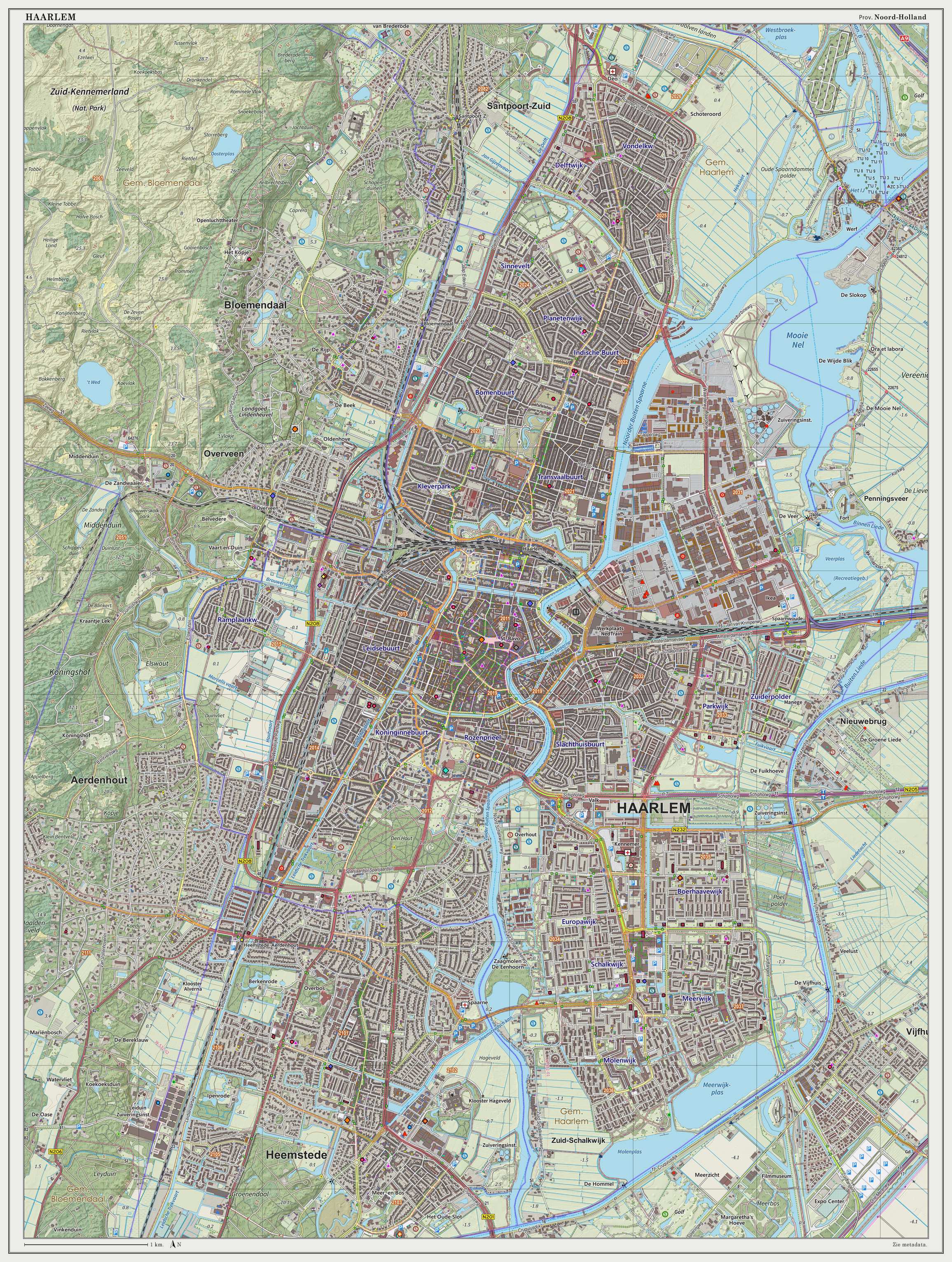 Topografische kaart van Haarlem (woonplaats). Resolutie: 300 pixels/km. Kaartbeeld samengesteld uit de open geodata van de Top10NL en Top25namen (Basisregistratie Topografie, Kadaster), Creative Commons BY licentie. Gebouwvlakken uit open geodata BAG extract. Wegen uit de OpenStreetMap, OpenStreetMap community. Reliëfschaduw uit de Actuele Hoogtekaart AHN2. Samenstelling en kleurenschema: Jan-Willem van Aalst, met QGIS2. Zie ook de Legenda.